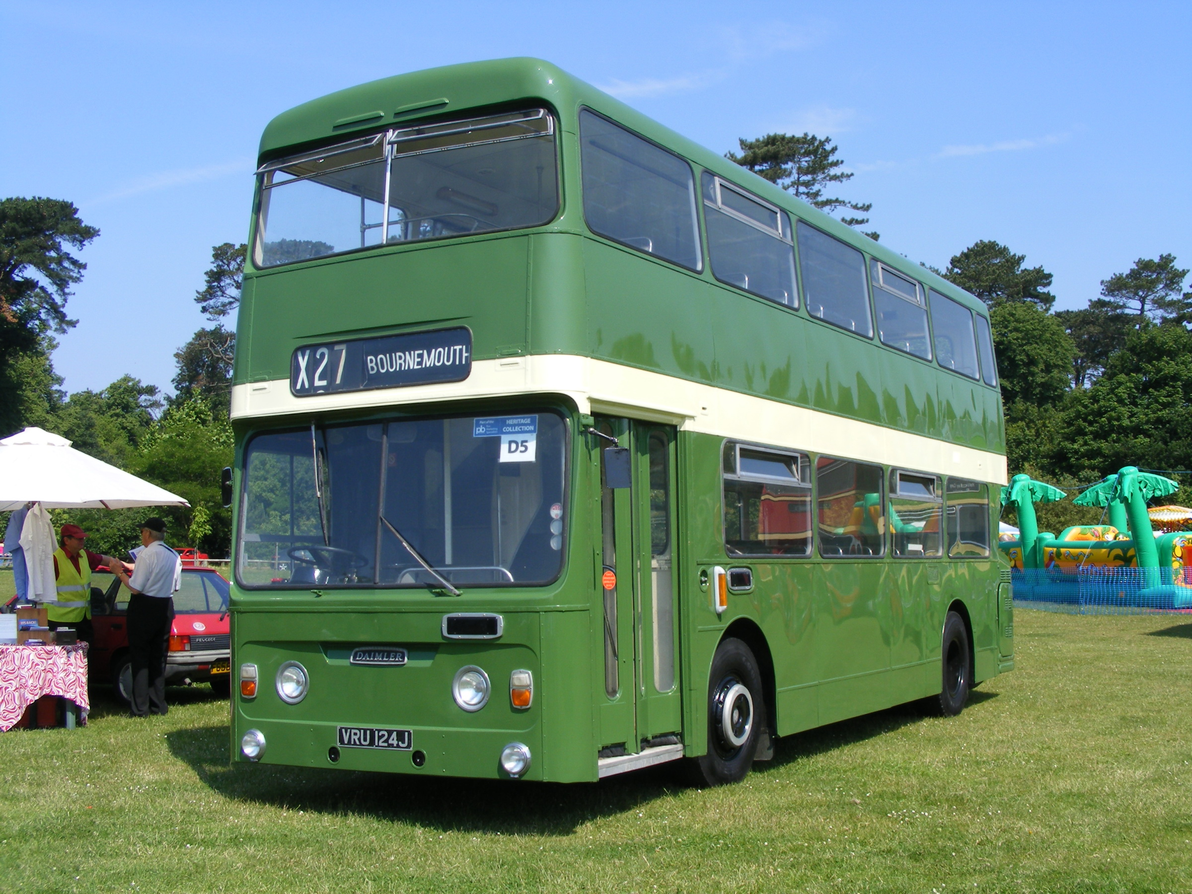 Hants & Dorset 1901 VRU124J Daimler Fleetline CRG6LXB / Roe H43/31F seen at Netley.